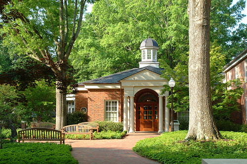 Furman welcome center